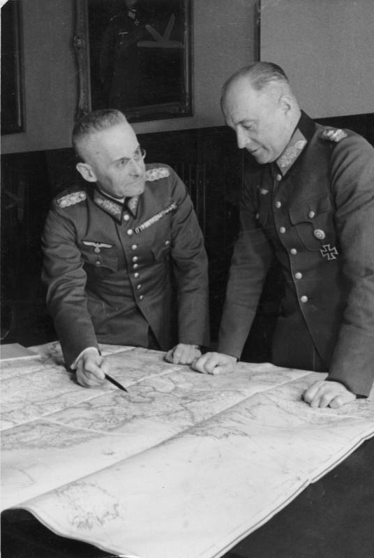 Franz Halder und Walther v. Brauchitsch Zentralbild, II. Weltkrieg 1939-1945 Überfall der faschistischen deutschen Wehrmacht auf Polen vom 1.9. bis Anfang Oktober 1939. Die Leitung der gesamten Operationen des Heeres hatte der Oberbefehlshaber des Feldheeres, Generaloberst von Brauchitsch. UBz: den Oberbefehlhaber des Heeres Generaloberst Walther von Brauchitsch (rechts) mit dem Chef des Generalstabes des Heeres General der Artillerie Franz Halder während des Polenfeldzuges. 11 890 - 39 Abgebildete Personen: Brauchitsch, Walther von: Generalfeldmarschall, Oberbefehlshaber des Heeres, Deutschland (GND 116414855) Halder, Franz: Generaloberst, Ritterkreuz (RK), Heer, Deutschland (GND 11870091X) Information added by Wikimedia users.EN translation: Franz Halder and Walther von Brauchitsch 2nd World War 1939-1945. Operation of the Fascist armed forces in Poland from Sep. 1st until the beginning of Oct. 1939. The management of the entire operations of the army is the Commander-in-Chief of the Army, General von Brauchitsch. Shown here: the commander in chief of the army, Colonel General Walther von Brauchitsch (right) with the Chief of the Army General Staff, General of Artillery [Lt. Gen.] Franz Halder during the Polish campaign. Personal details: - Brauchitsch, Walther von: Field Marshal, Commander-in-Chief of the Army, Germany - Halder, Franz: Colonel General, Knight's Cross , Army, Germany